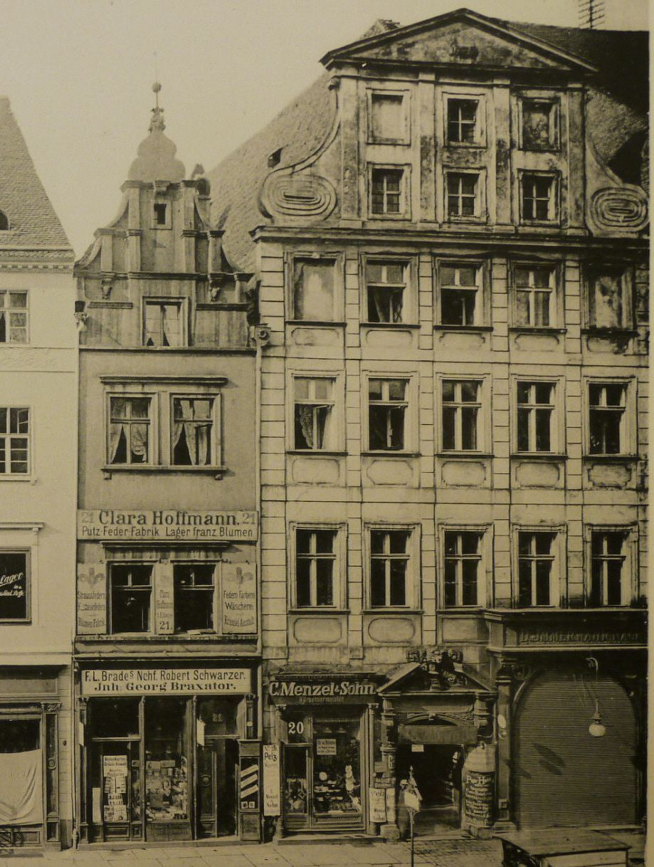 Wygląd kamienicy nr 20 i 21 na wrocławskim Rynku, lata 1895-1900